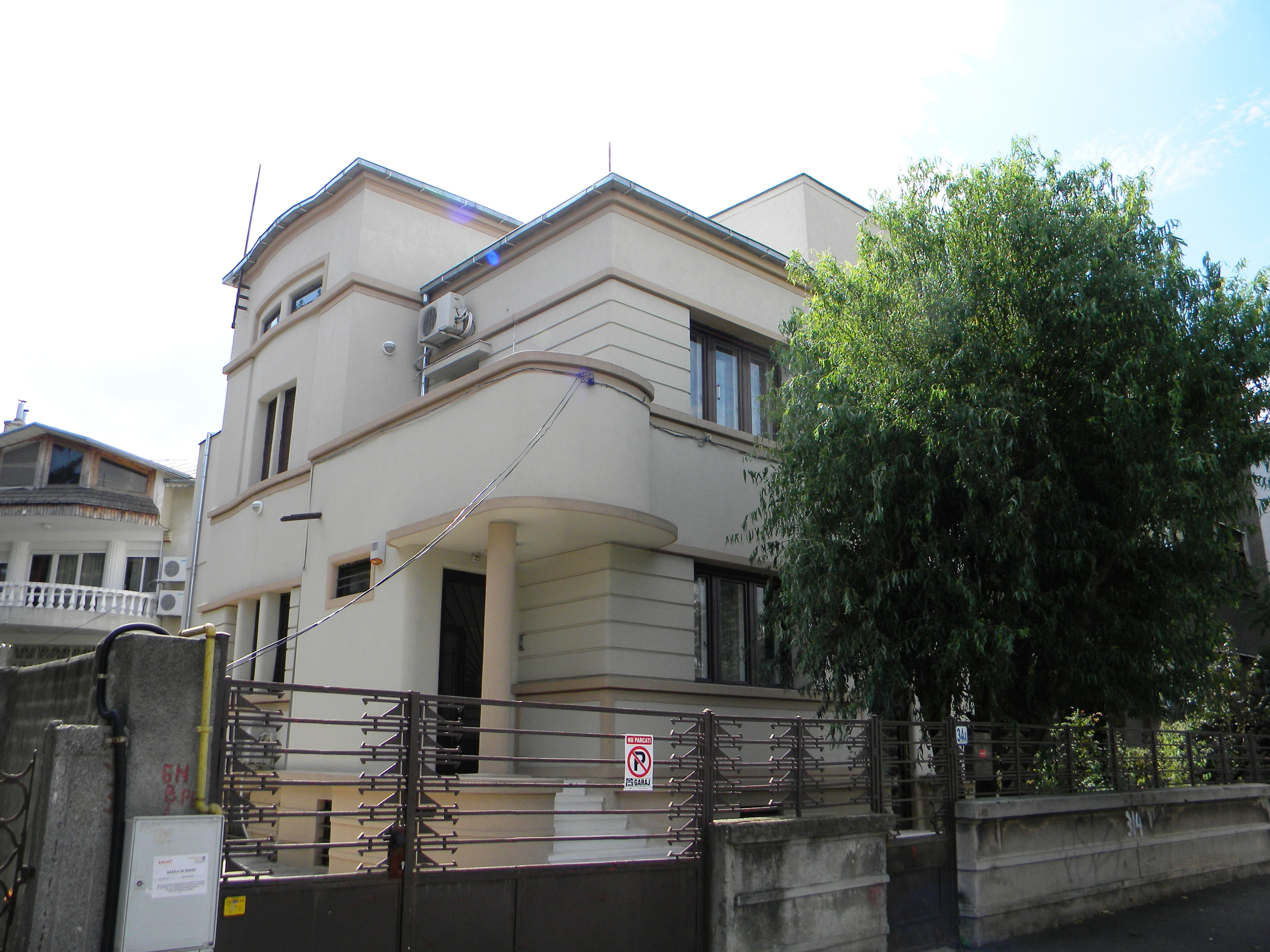 Bucuresti, Romania, Str. Alexandru Constantinescu nr. 34A=34, sect. 1; B-II-m-B-18474